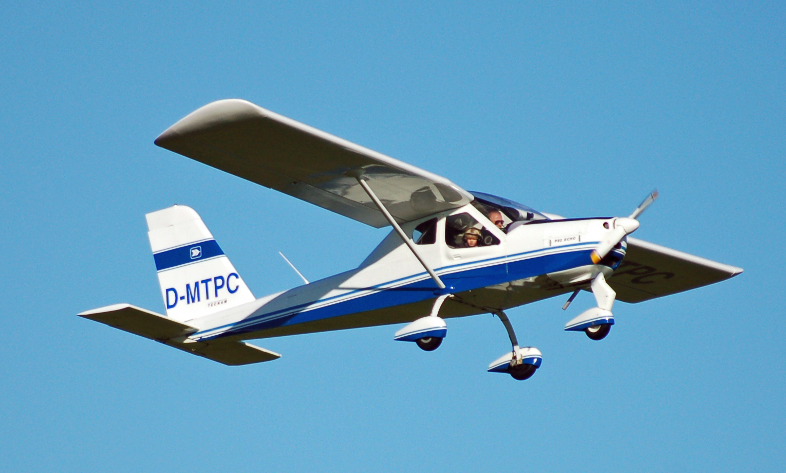 Tecnam P92 Echo (D-MTPC) über dem Flugplatz Uetersen